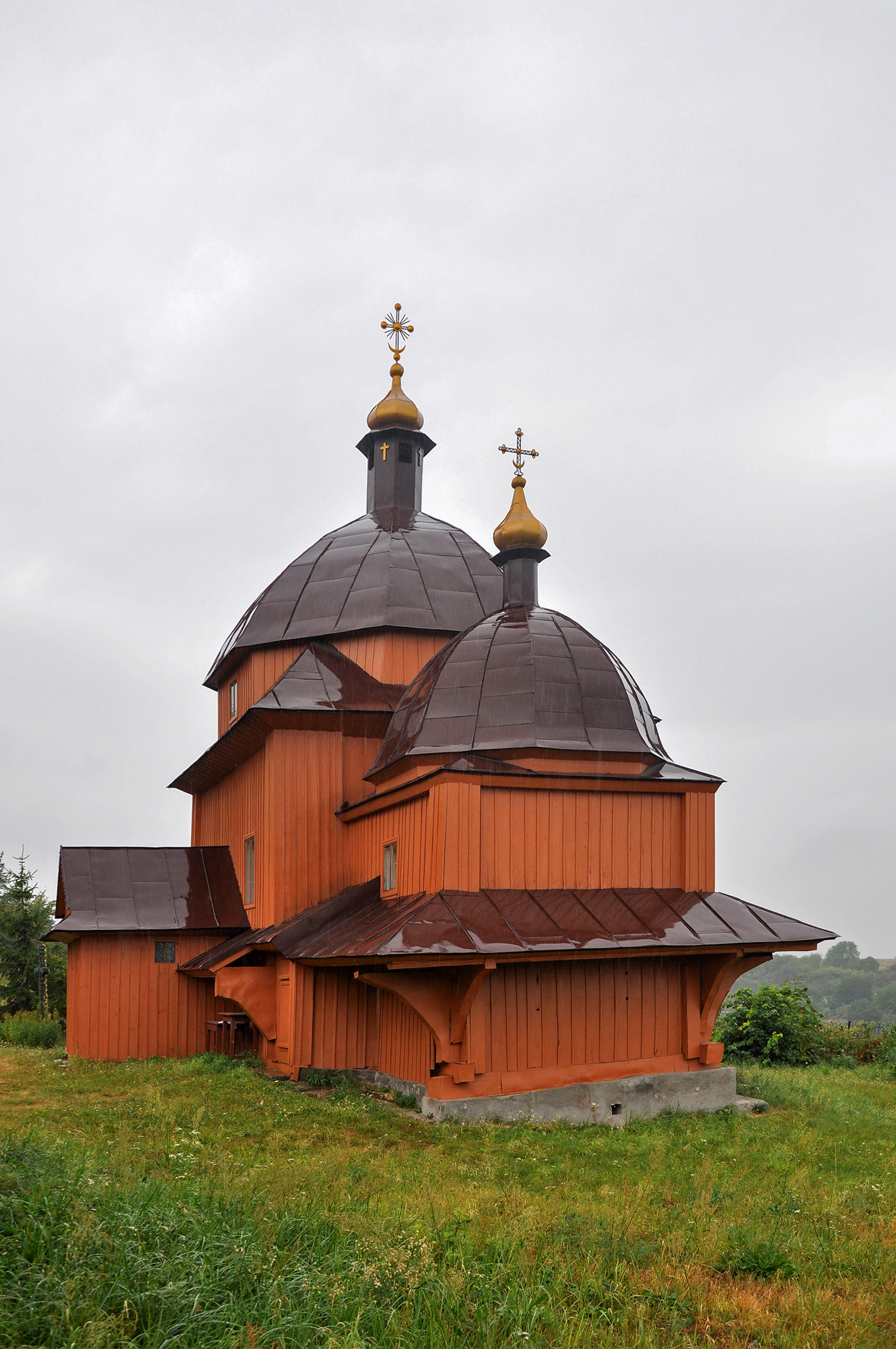 Церква Св.Юрія (дер.), с.Гринів